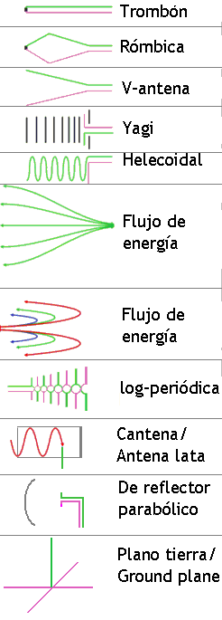 la version moderna de Tipos_de_antenas_esp.gif en es que ya no se puede subir...